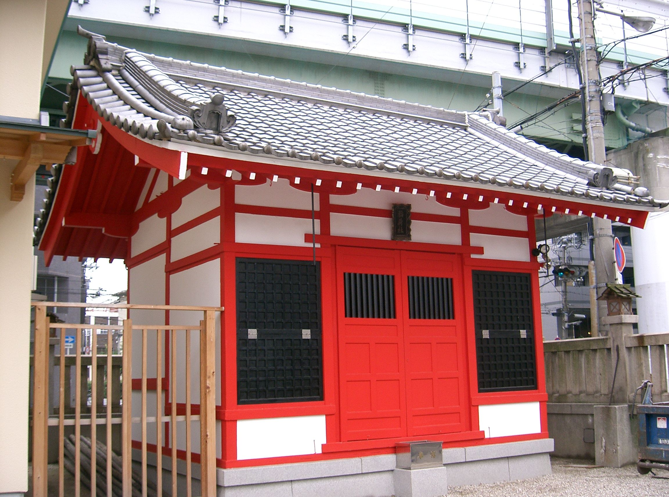 今宮戎神社 稲荷社